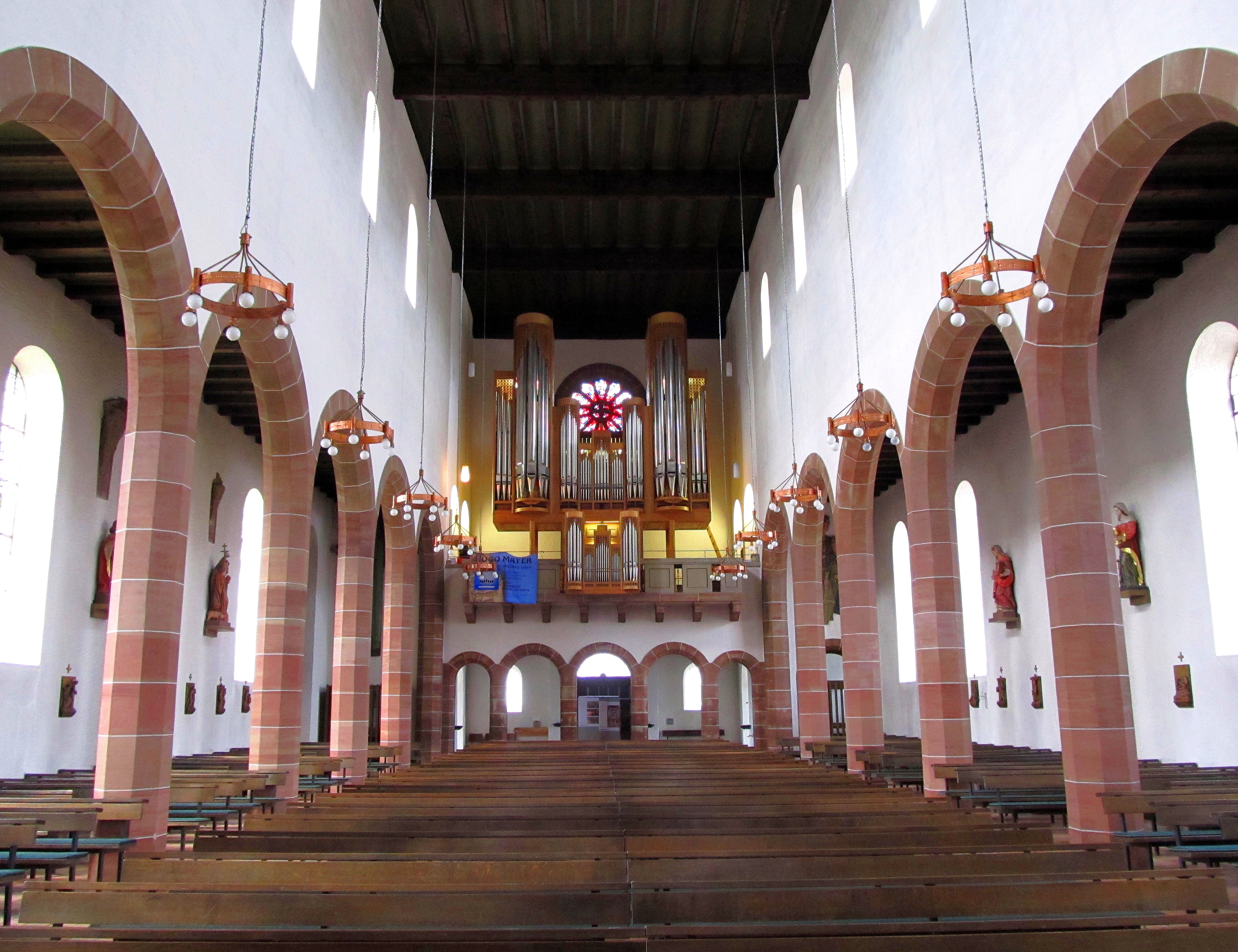 Blick ins Innere der katholischen Pfarrkirche St. Peter und Paul in Losheim, Gemeinde Losheim am See, Landkreis Merzig-Wadern, Saarland